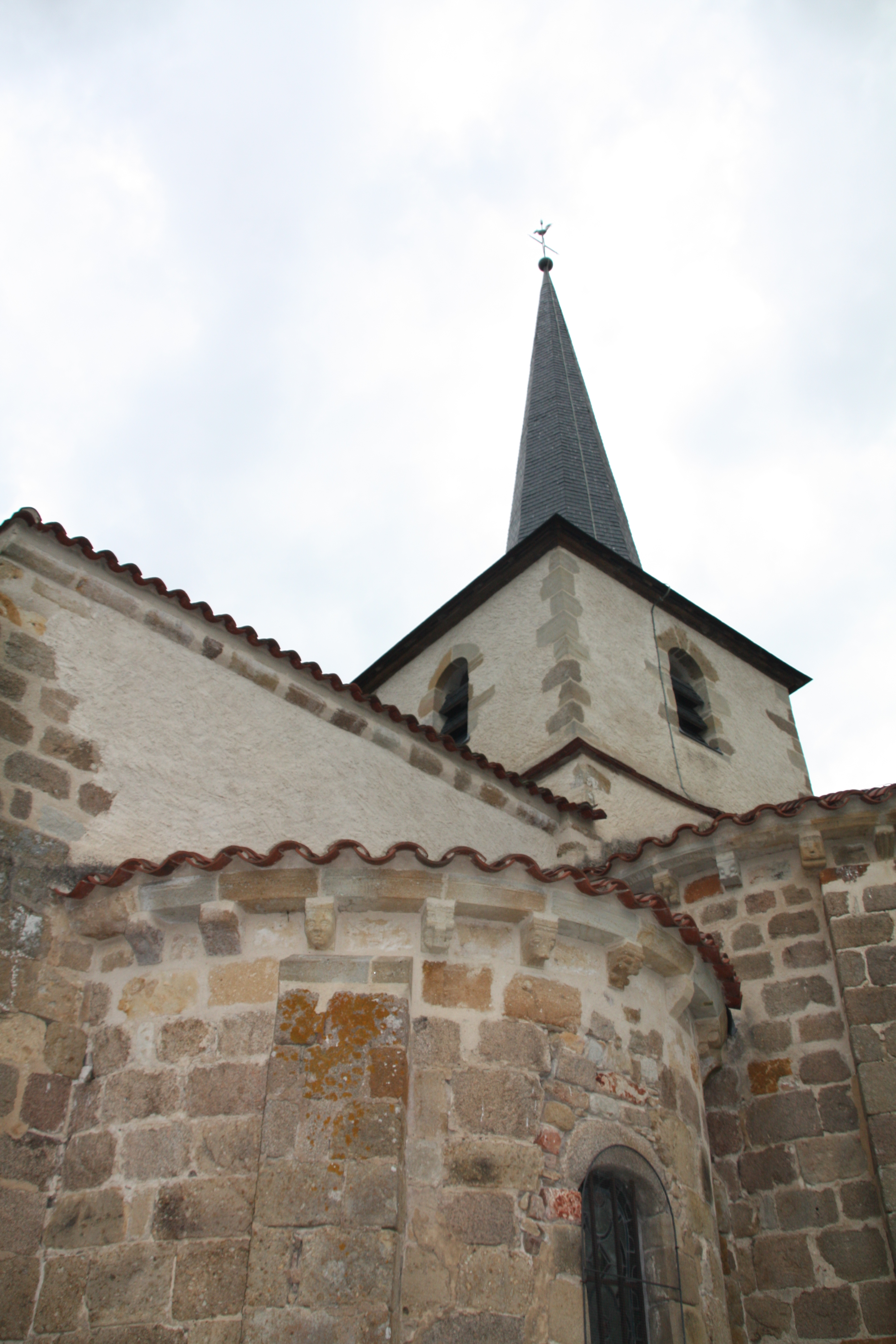 Église de Saint-Marcel-en-Murat, France